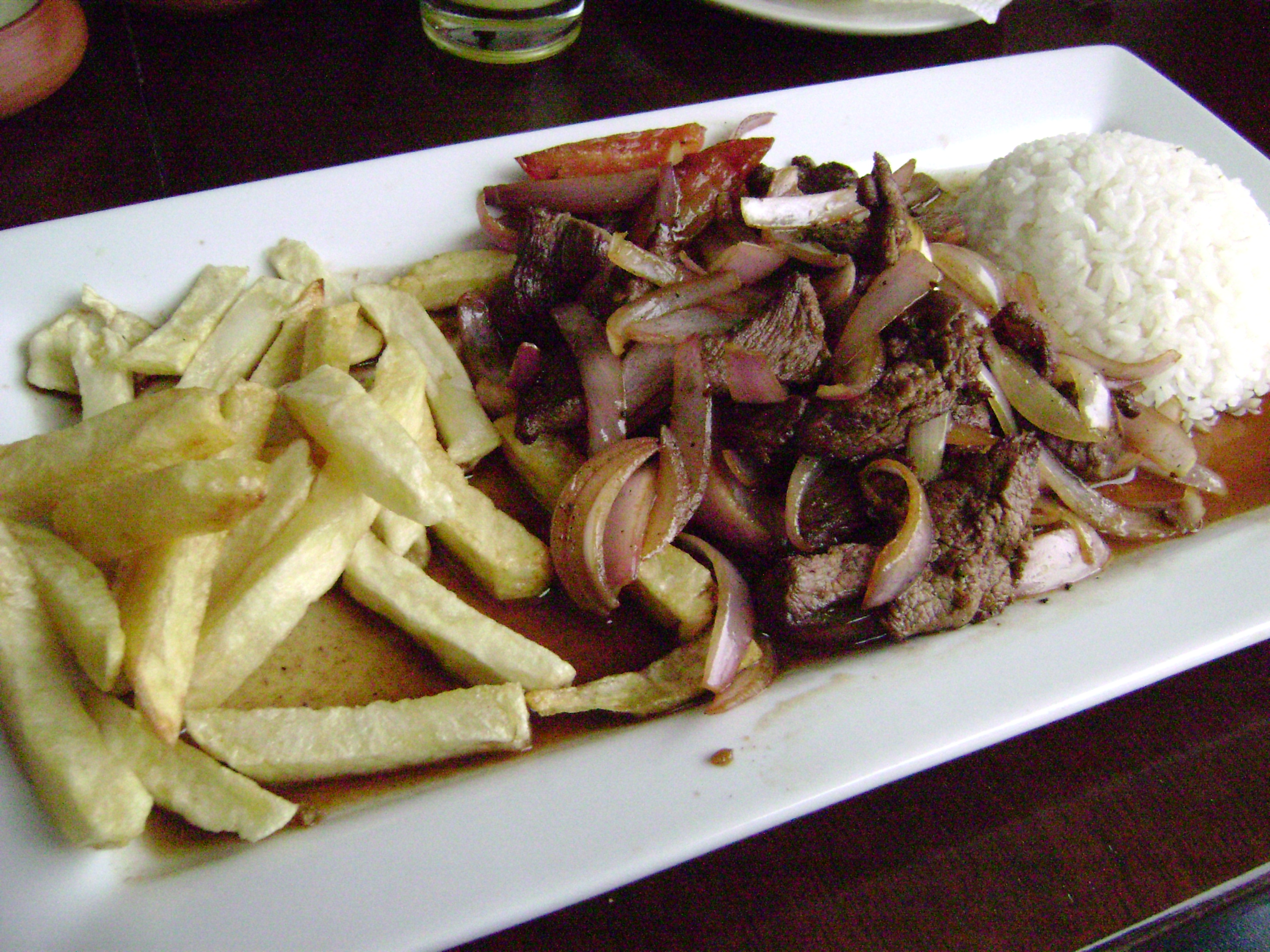 Lomo saltado, acompañado de papas fritas y arroz blanco.